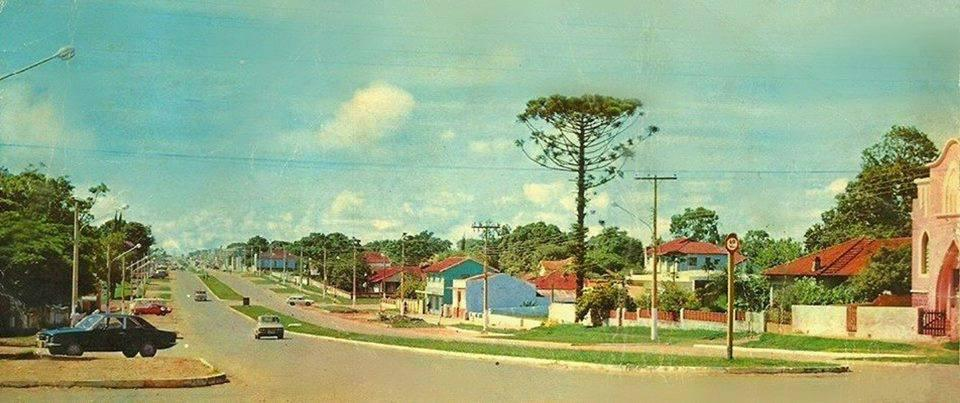 Ponta Porã anos 70. Avenida Brasil com Baltazar Saldannha.